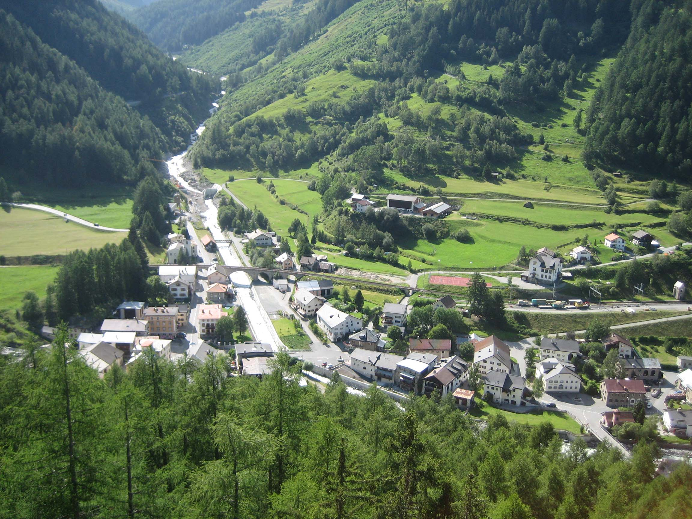 Susch, gegen den Flüelapass